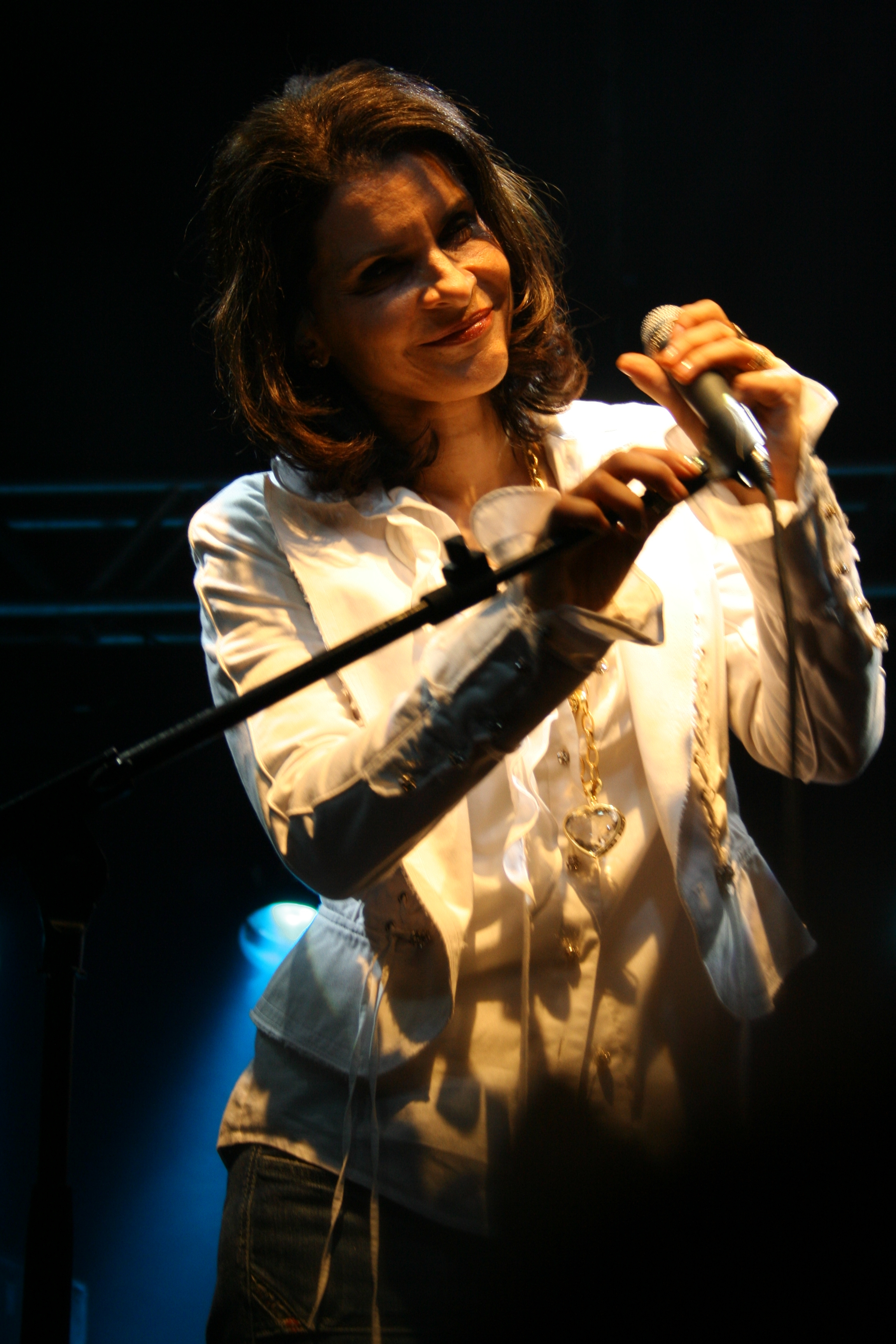 show Topo Todas Tour na Confraria das Artes, em Florianópolis (SC).